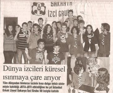 Sakarya İzci Grubu Jota Haberi